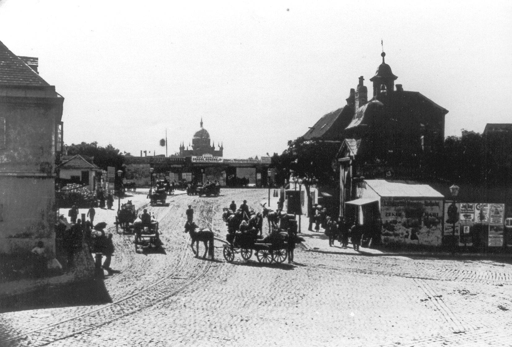 Matzleinsdorfer Platz mit Linienkapelle